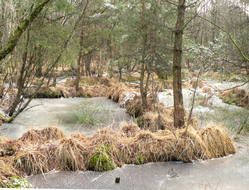 Mit Wasser vollgelaufene Kuhlen als Spuren des bäuerlichen Torfstichs im Altwarmbüchener Moor